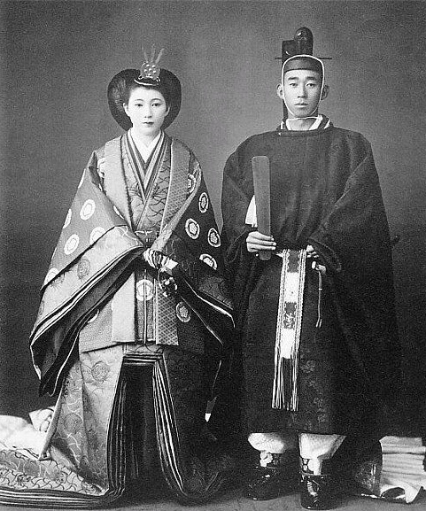 朝香宮孚彦王と同妃千賀子